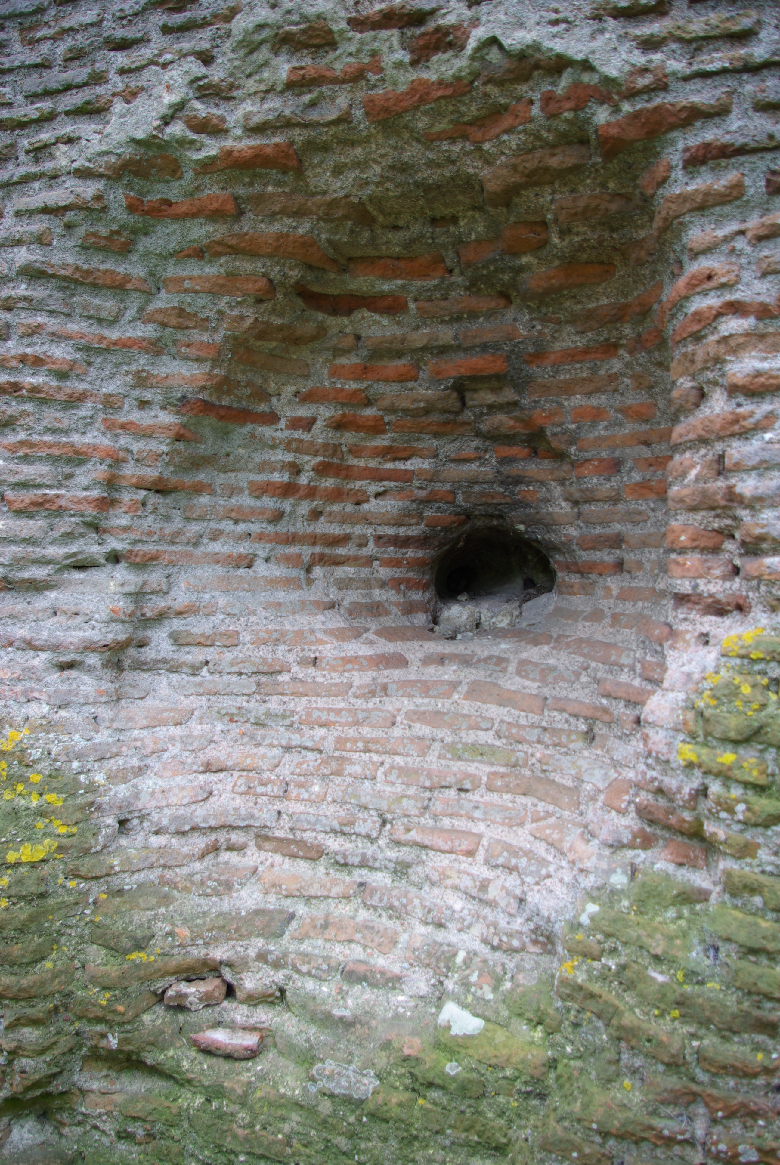 Trou dans la pile romaine de Cinq-Mars-la-Pile permettant de voir la construction extérieure en brique et le remplissage intérieur en briques pilées, sable et mortier de chaux.